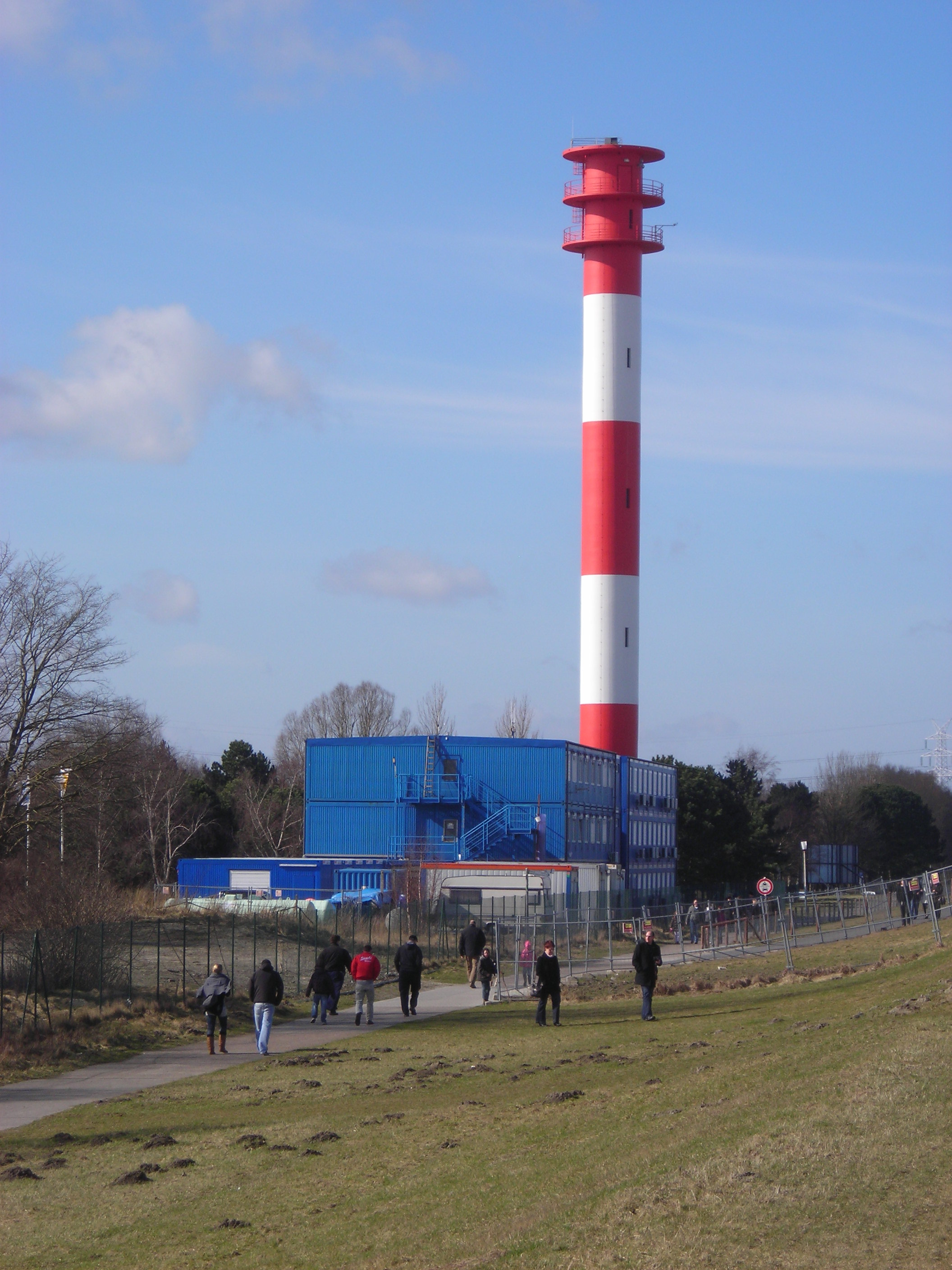 Der Leuchtturm Voslapp, Oberfeuer mit neuem Anstrich. Im Vordergrund die Bauleitung des JadeWeserPorts